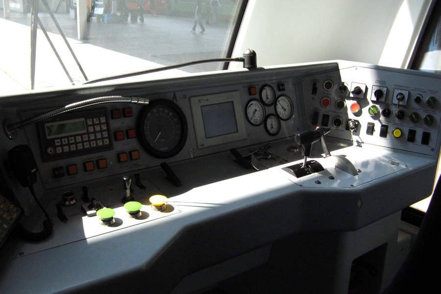 Pulpit maszynisty szynobusu SA109-009